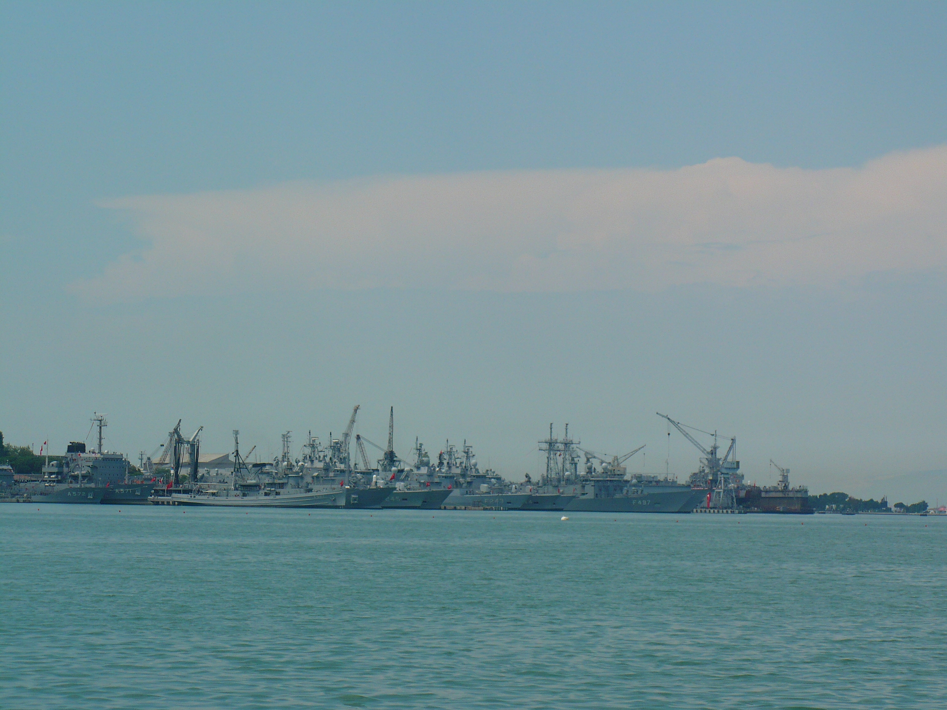 Gölcük'den görüntüler